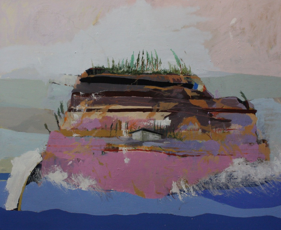 Oljemålning av Lars Palm, en ö i ett blått hav.